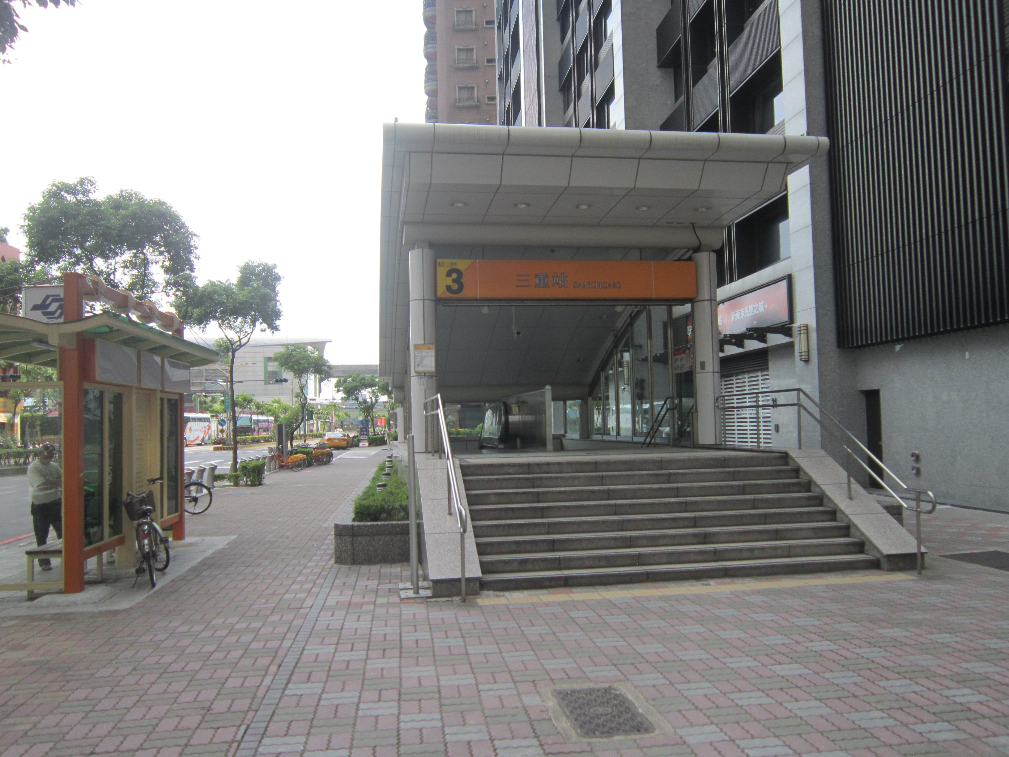 台北捷運新蘆線三重站三號出入口